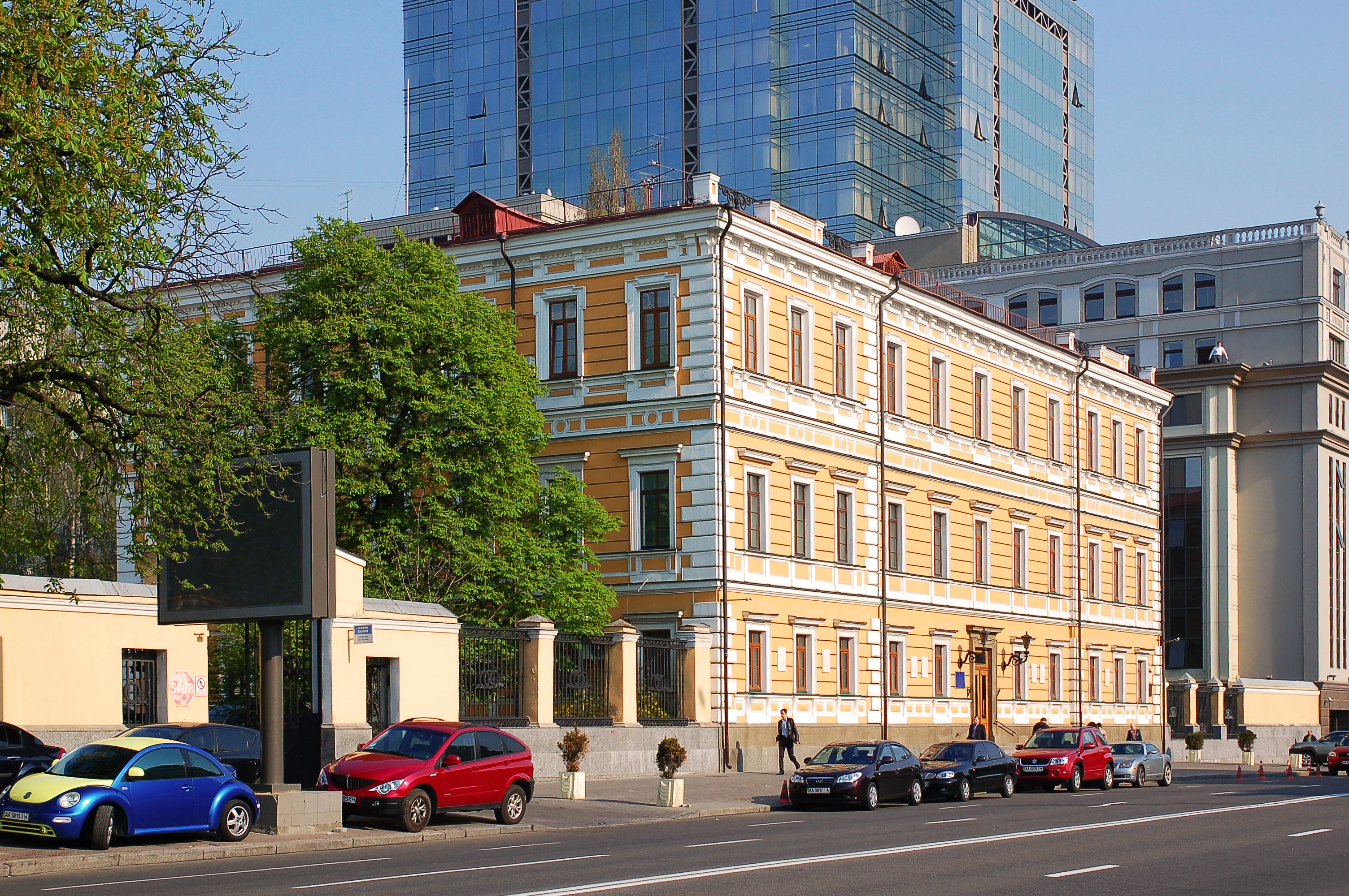 Будівля Президії Національної академії наук України (будинок № 54 по Володимирській вулиці у Києві)